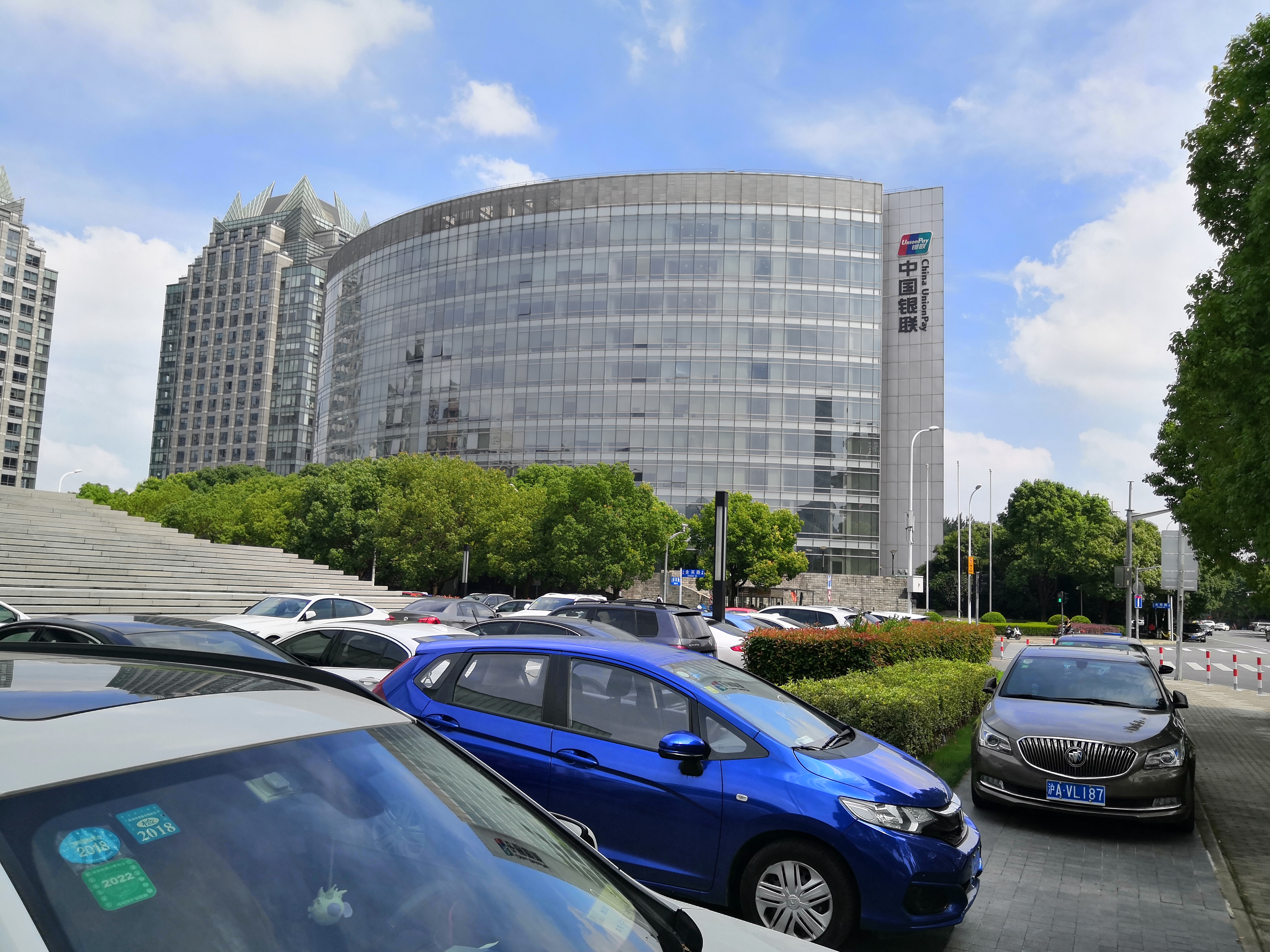 上海市浦东新区锦绣路998号（含笑路36号） 银联大厦